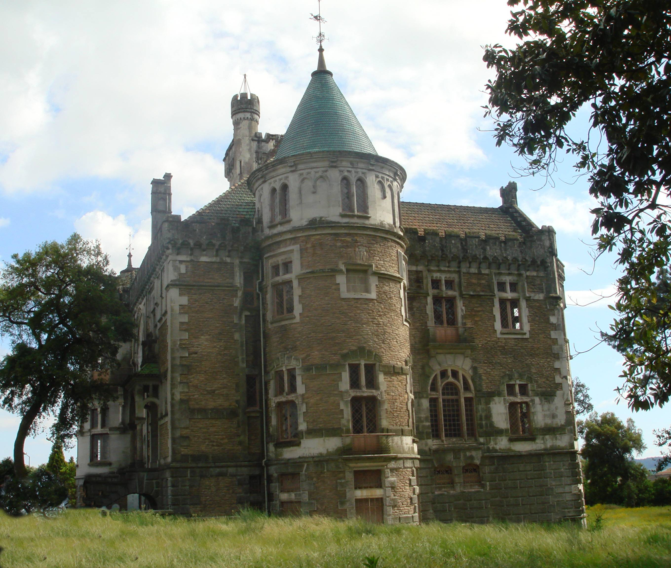 Castelo D. Chica, Palmeira, Braga, Portugal